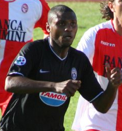 rimini-juventus, prima giornata di serie b 2006/07.